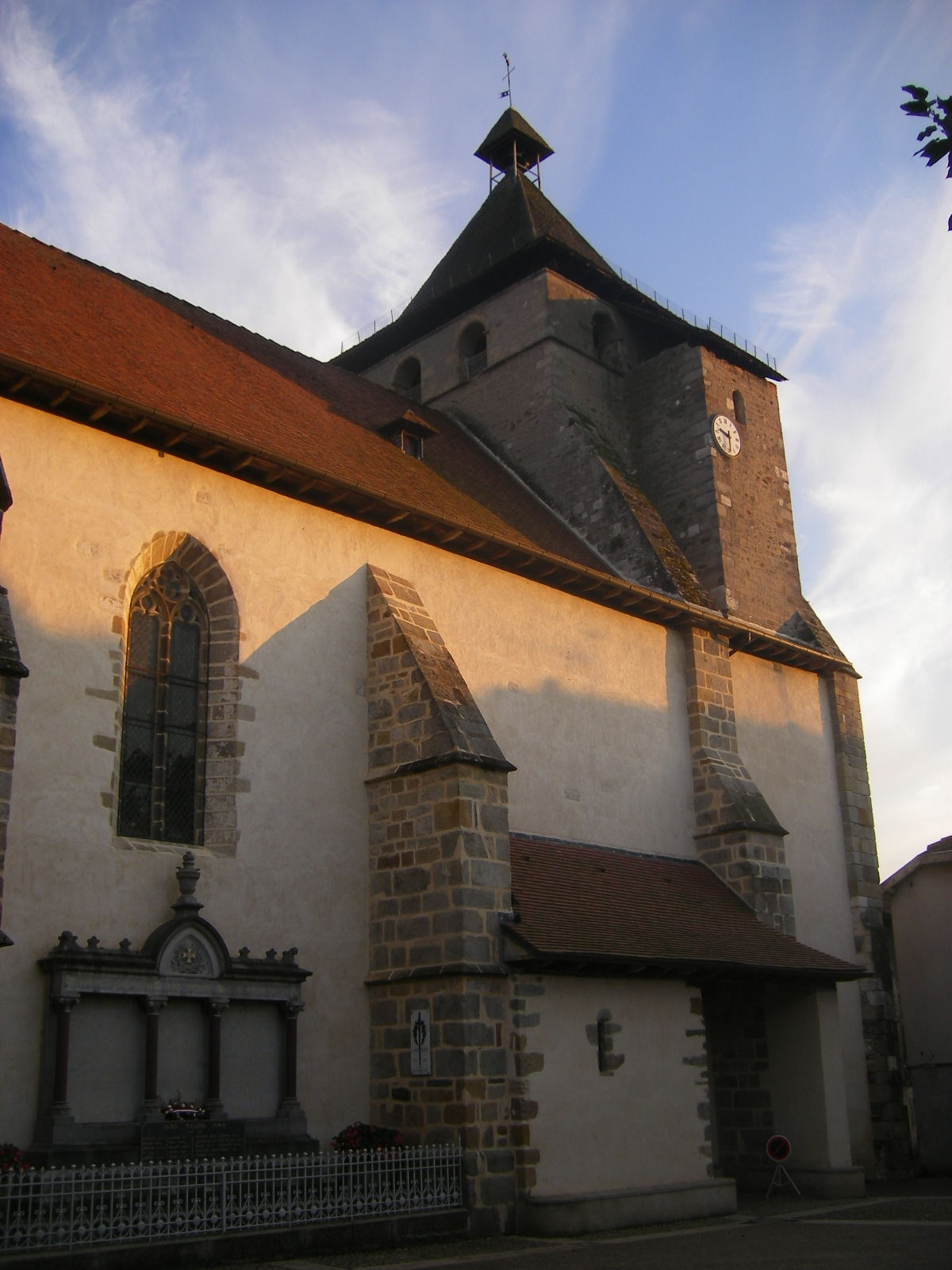 Maurs